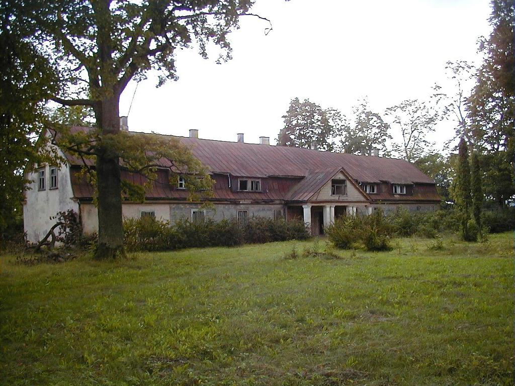 Liepas muiža 2001-09-02